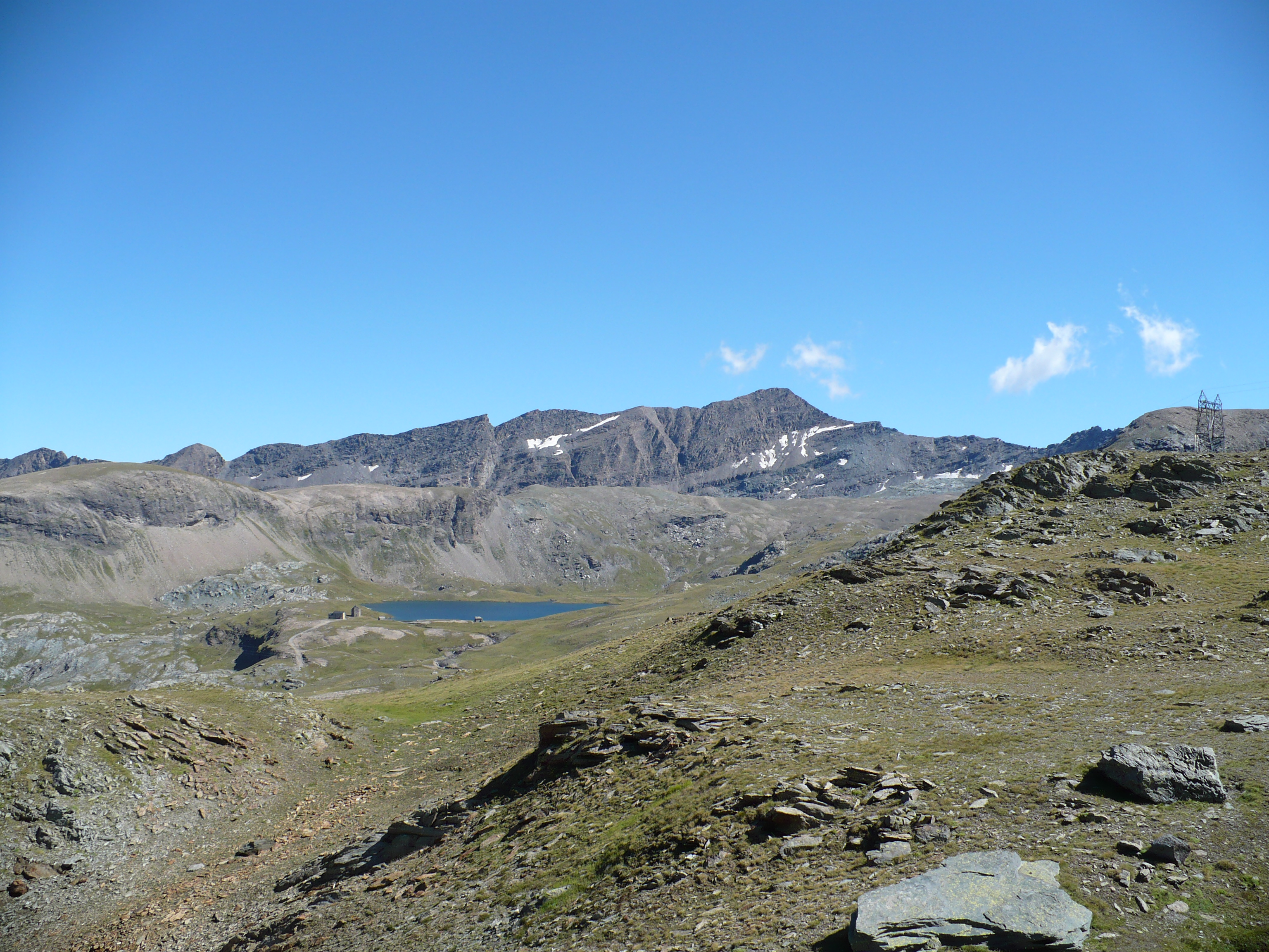 La Rosa dei Banchi ed in basso il Lago Miserin